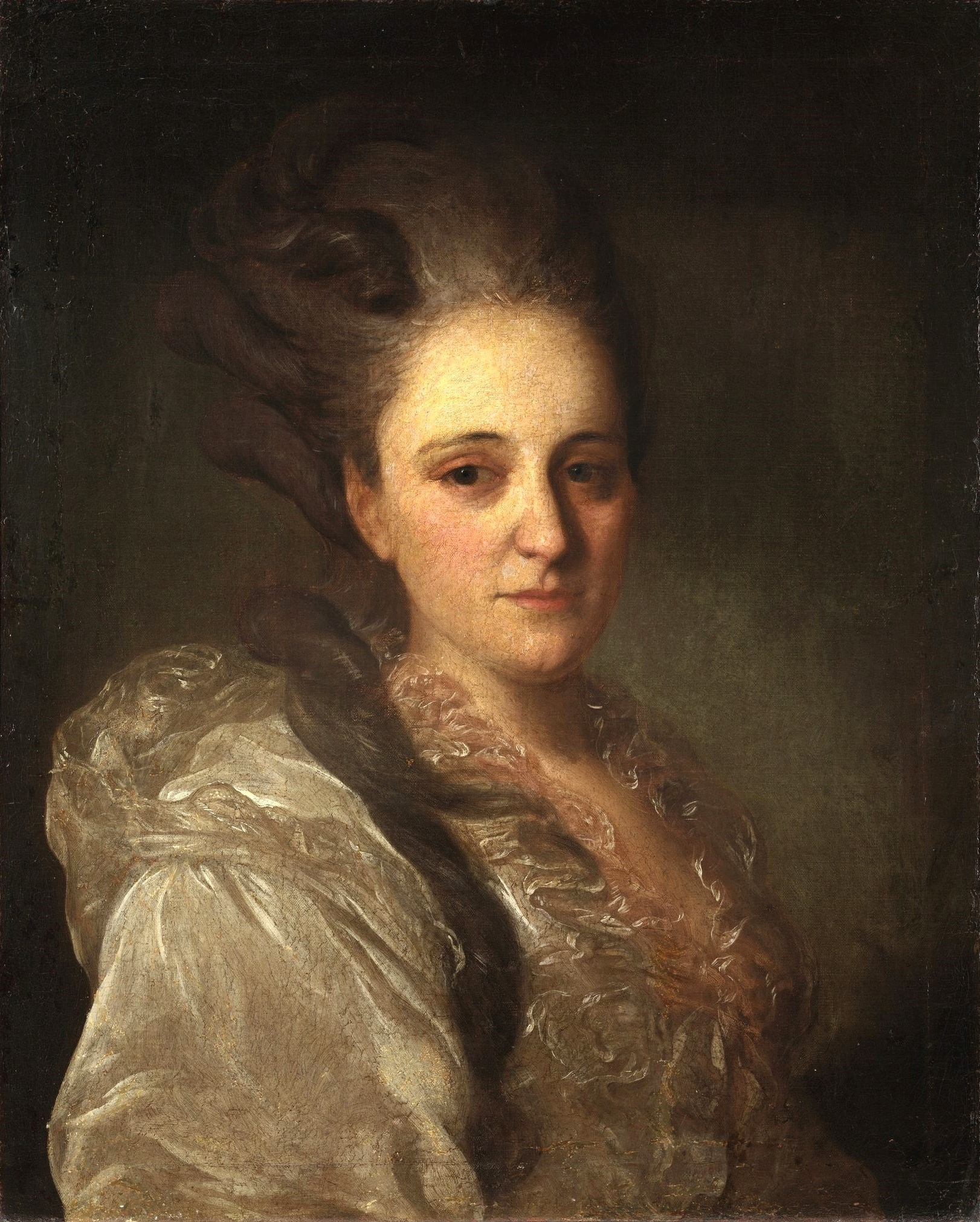 Варвара Андреевна Обрезкова, ур. Фаминцына (1744/1746-1815), кавалерственная дама орд. св. Екатерины, была третьей женой дипломата А.М. Обрезкова (1718-1787).